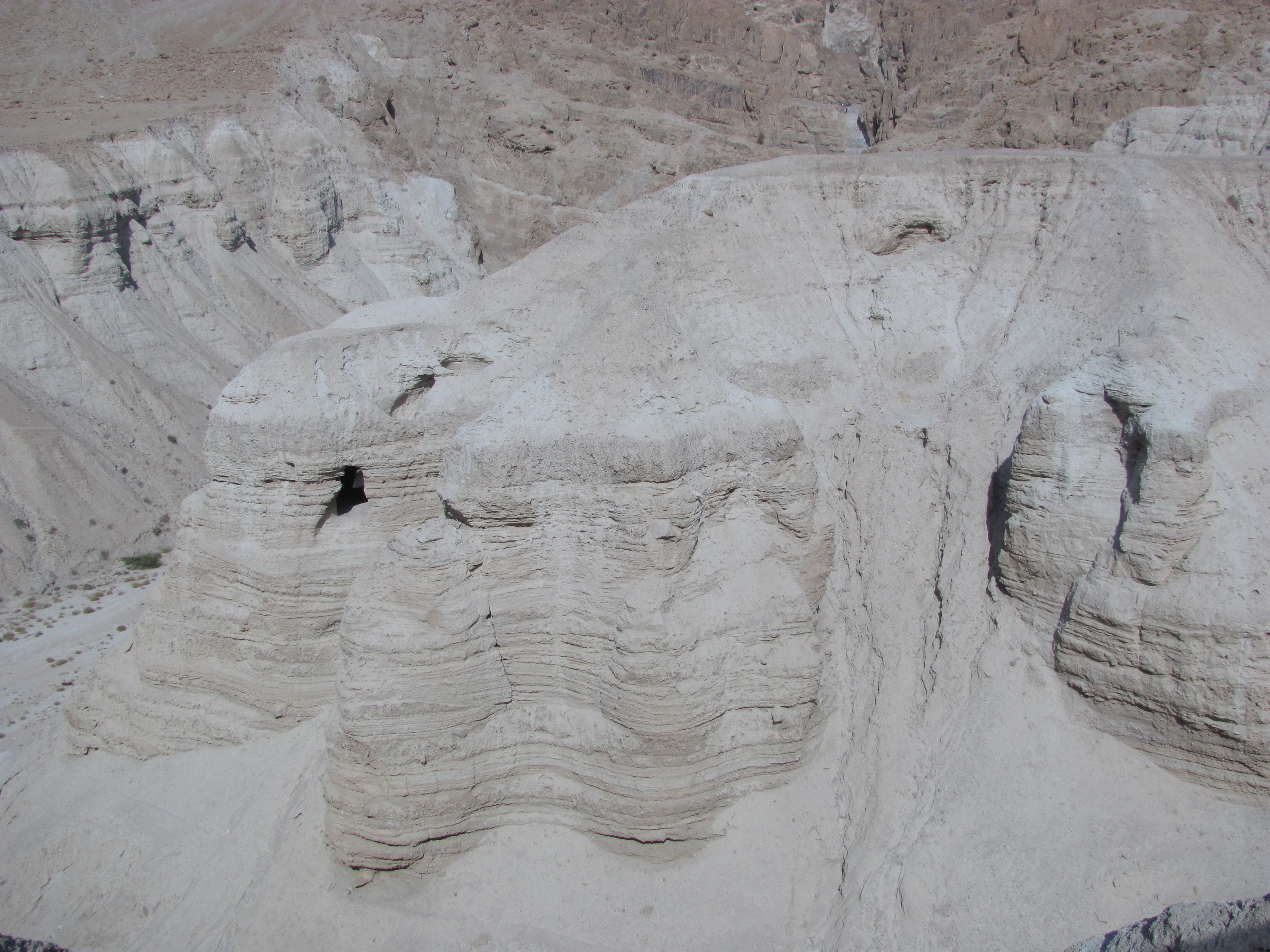 Qumrán. Cuevas donde se hallaron los manuscritos del mar muerto